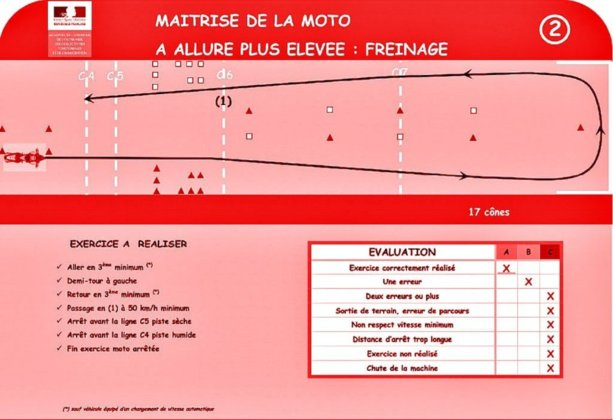 Epreuve d'évitement, permis moto Français